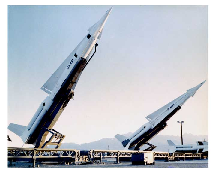 MIM-14 Nike-Hercules